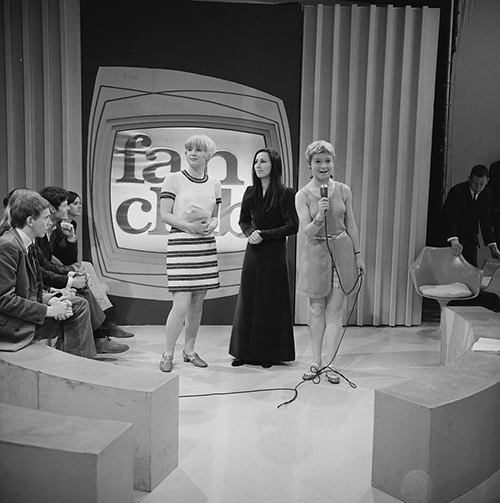 Julie Felix in het televisieprogramma Fanclub Met Ati Dijckmeester en Judith Bosch